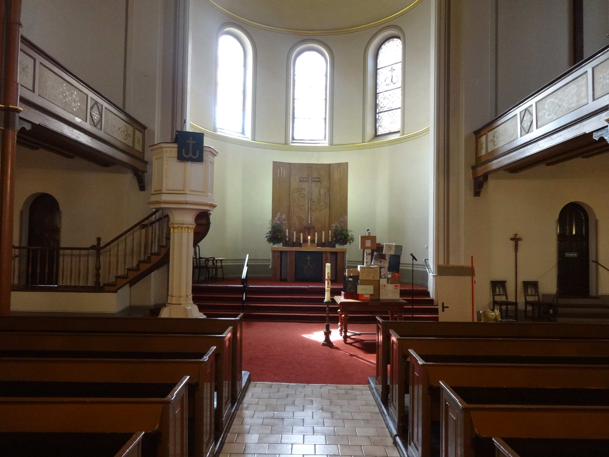 Evangelisch-Lutherische Kirche Berlin-Luisenstadt, auf Grund ihrer Lage in der Annenstraße auch Annenkirche genannt. Bildmitte: Der Altar von Wilhelm Groß